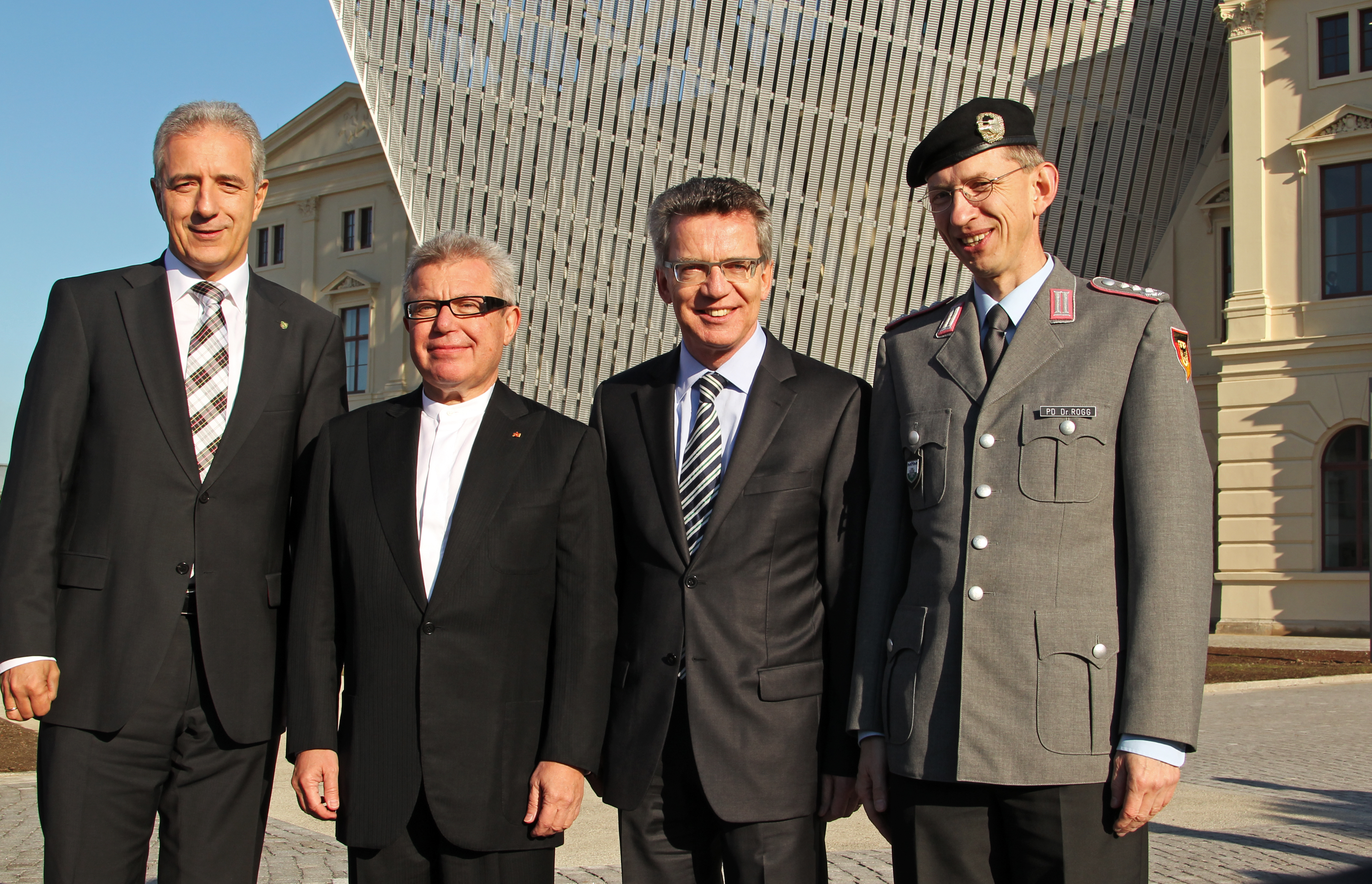 Vor dem Neubau des Museums v.l.n.r.: Der Ministerpräsident des Freistaates Sachsen,Stanislaw Tillich, der Architekt des Museumsneubaus Daniel Libeskind, der Bundesminister der Verteidigung, Dr.Thomas de Maizière, und der Direktor des Museums, Oberst PD Dr.Matthias Rogg.Nach einer siebenjährigen Umbauzeit wird das Militärhistorische Museum der Bundeswehr in Dresden am 14. Oktober 2011 neu eröffnet. Hierzu findet ein Festakt statt, in dessen Rahmen neben dem Bundesminister der Verteidigung, Dr.Thomas de Maizière, der Ministerpräsident des Freistaates Sachsen,Stanislaw Tillich, der Architekt des Museumsneubaus Daniel Libeskind und der Direktor des Museums, Oberst PD Dr. Matthias Rogg,Worte an die Gäste richten.©Bundeswehr/Mandt